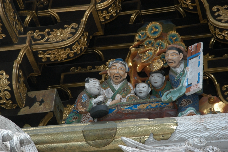 Nikko, november 2003, info in de Metadata